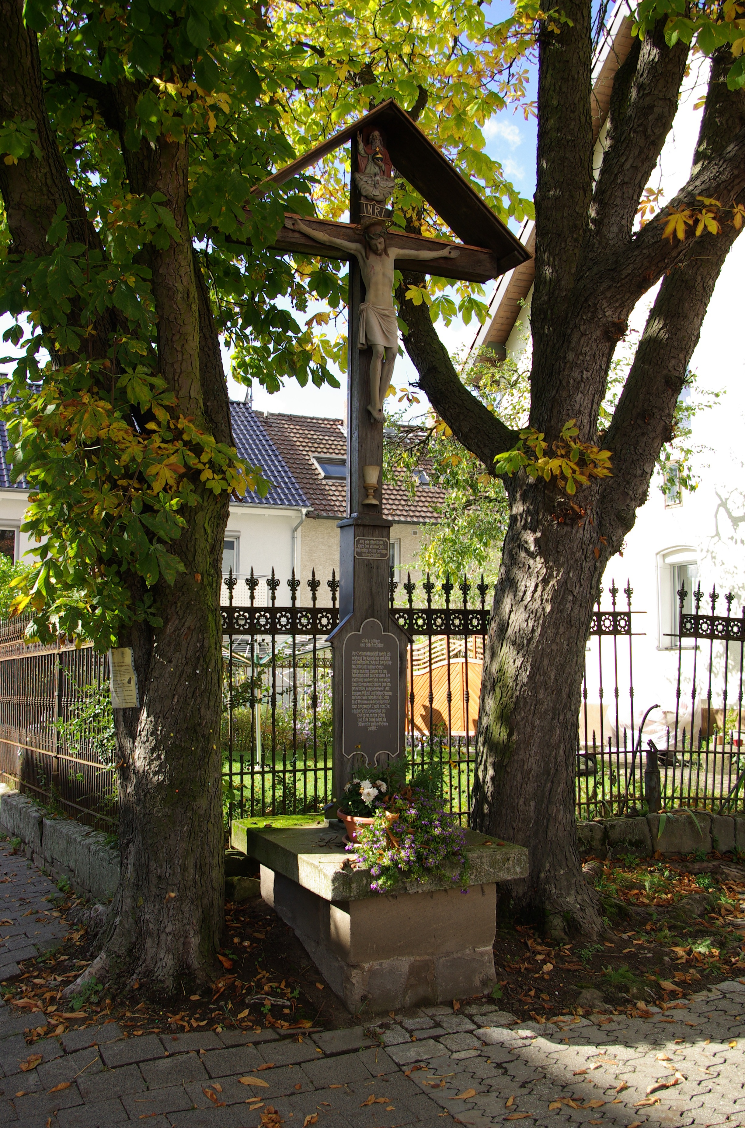 Wegkreuz im Erlanger Stadtteil Häusling